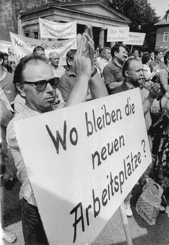 ADN- Ralf Hirschberger 21.7.90 Bez. Erfurt: Kundgebung Entscheidende Maßnahmen gegen Sozialabbau und für die Schaffung neuer Arbeitsplätze forderten Kalikumpel des Südharz-Reviers auf einer Kundgebung im Zentrum von Sondershausen. Das traditionsreichste deutsche Kalirevier soll nach 100jähriger Förderung stillgelegt werden.